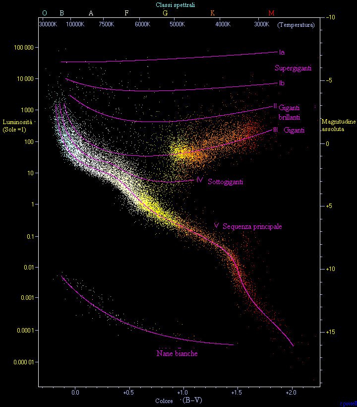 Hertzsprung-Russell diagram